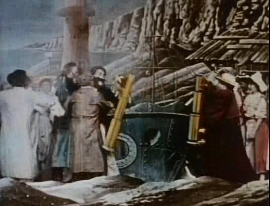 Méliès, Le voyage a travers l'impossible1904 colorizée 33